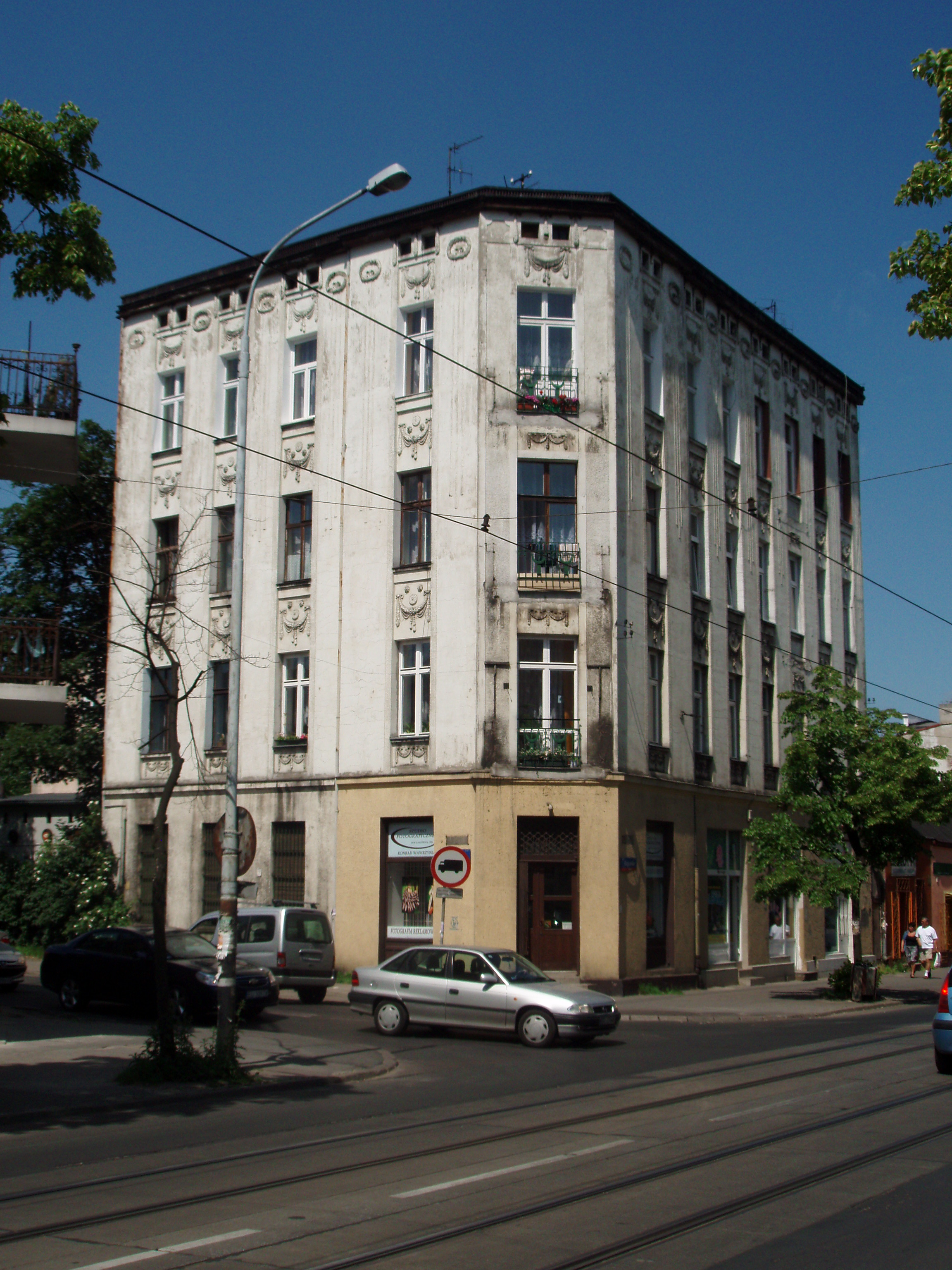 Ulica Rzgowska 37 w Łodzi, widok na kamienicę od ul. Rzgowskiej